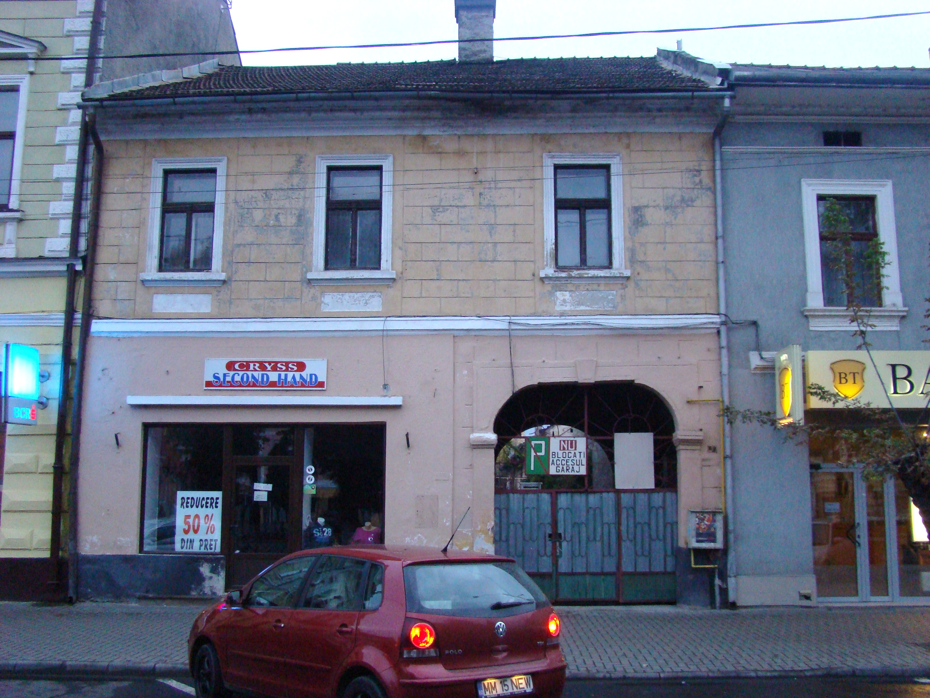 Casa Brenner, municipiul Sighetu Marmației, Piața Libertății 9